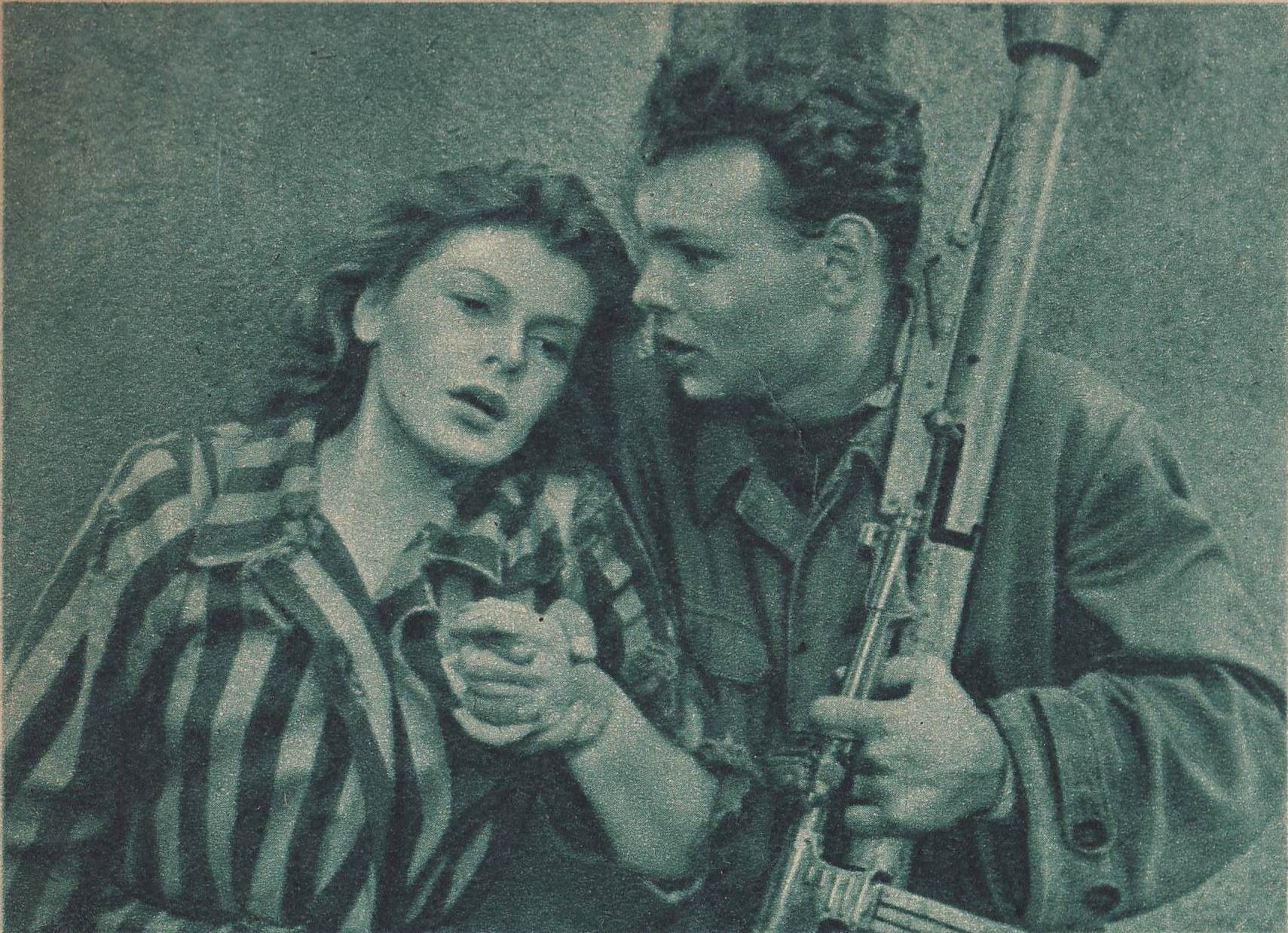 Barbara Drapińska w filmie "Němá barikáda"